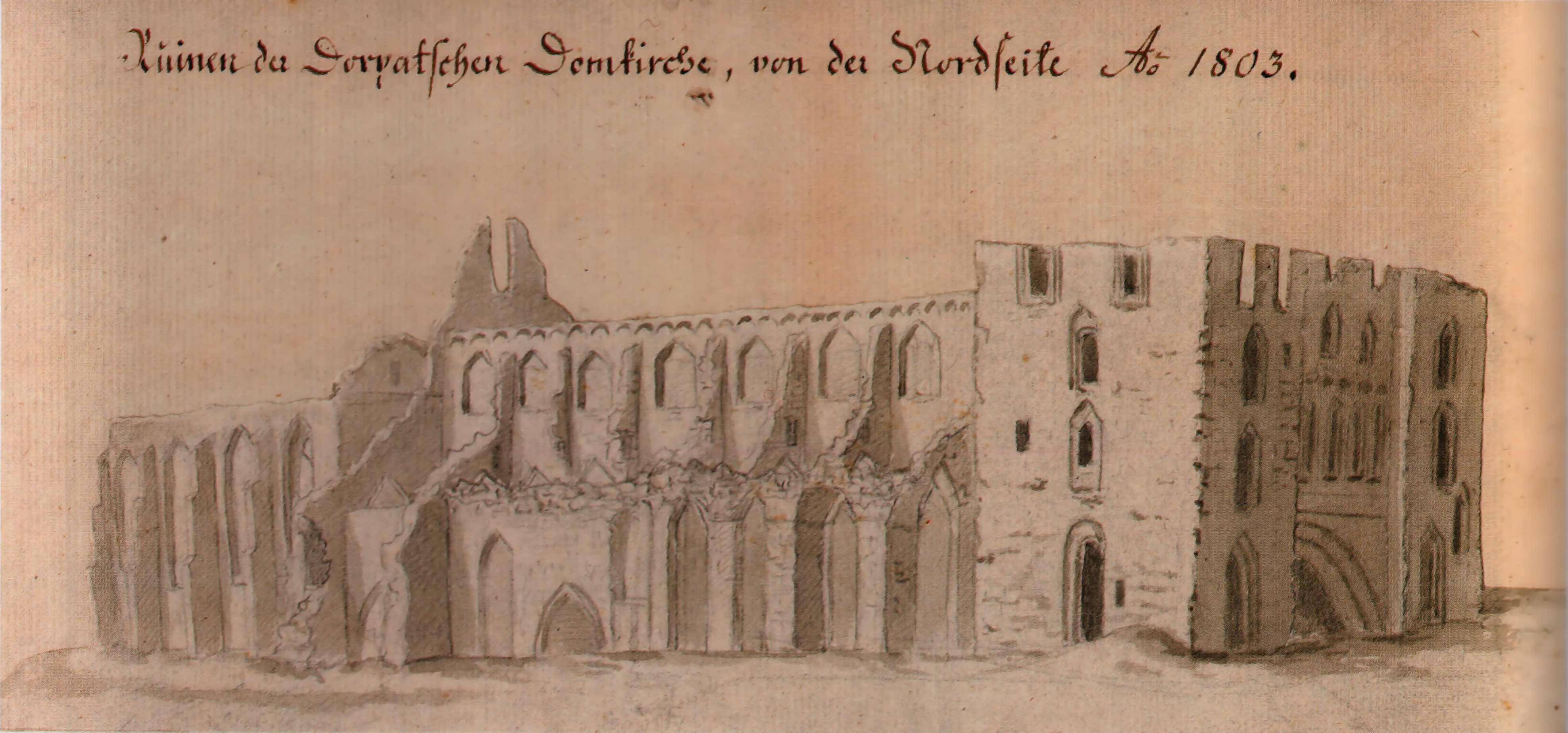 Tartu Toomkiriku varemed põhjaküljelt